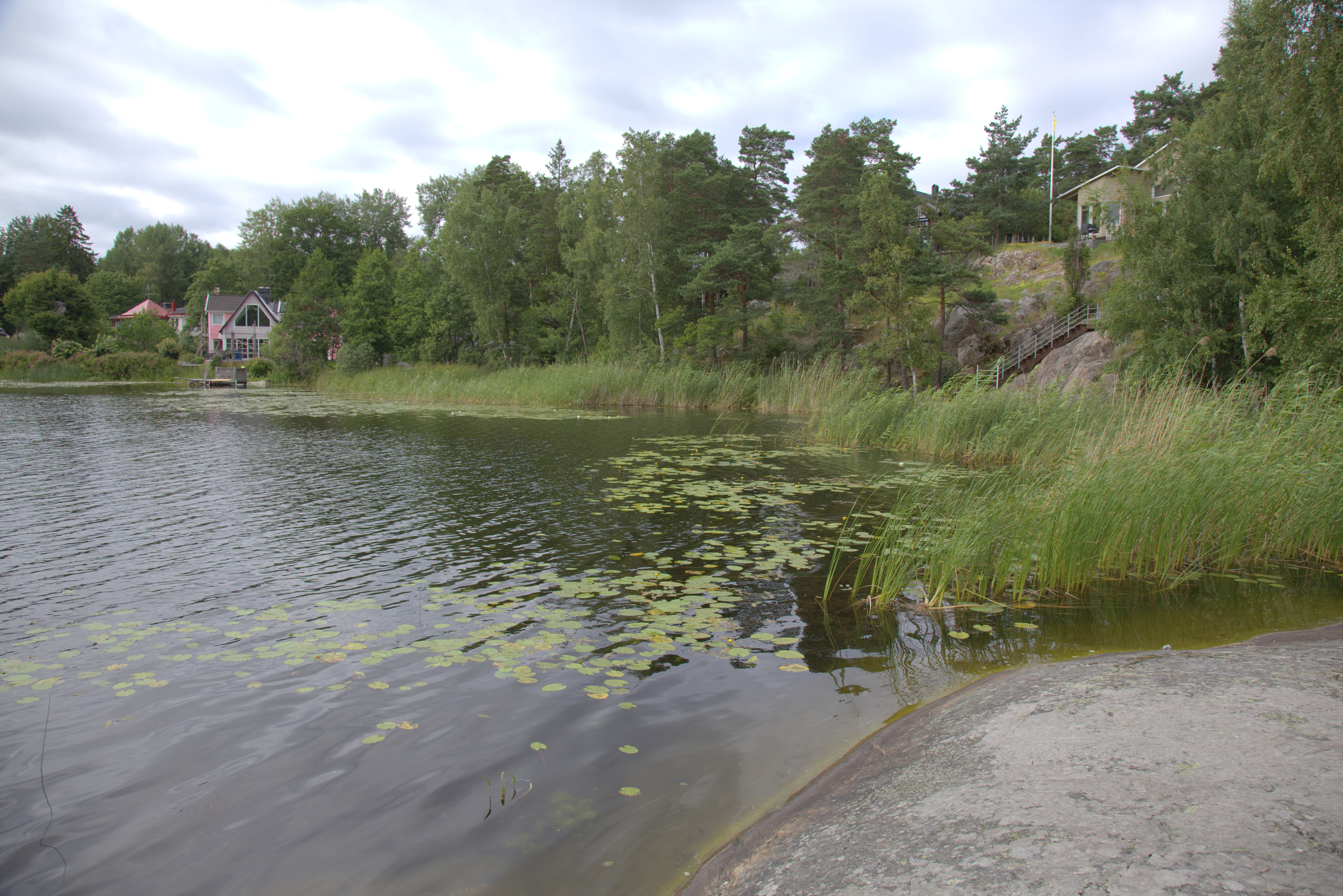 Östra änden av Ösbyträsk.